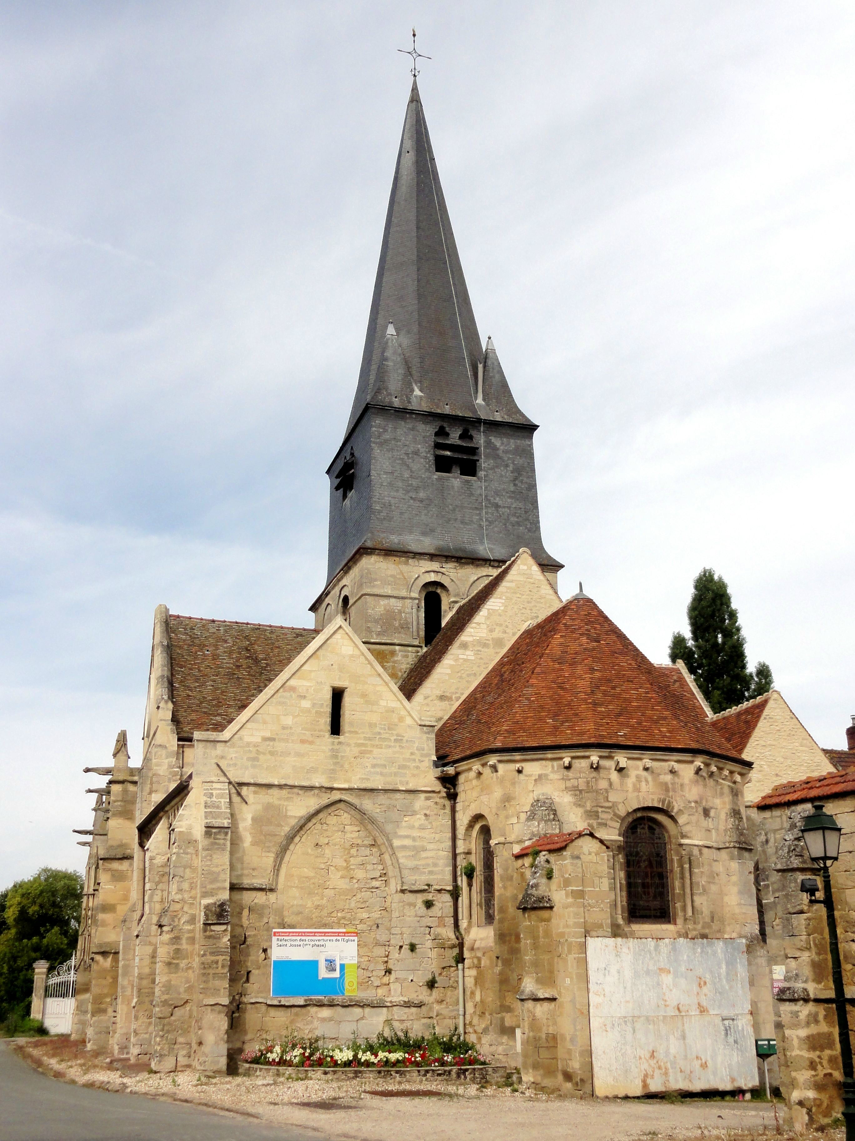 Vue depuis l'est.